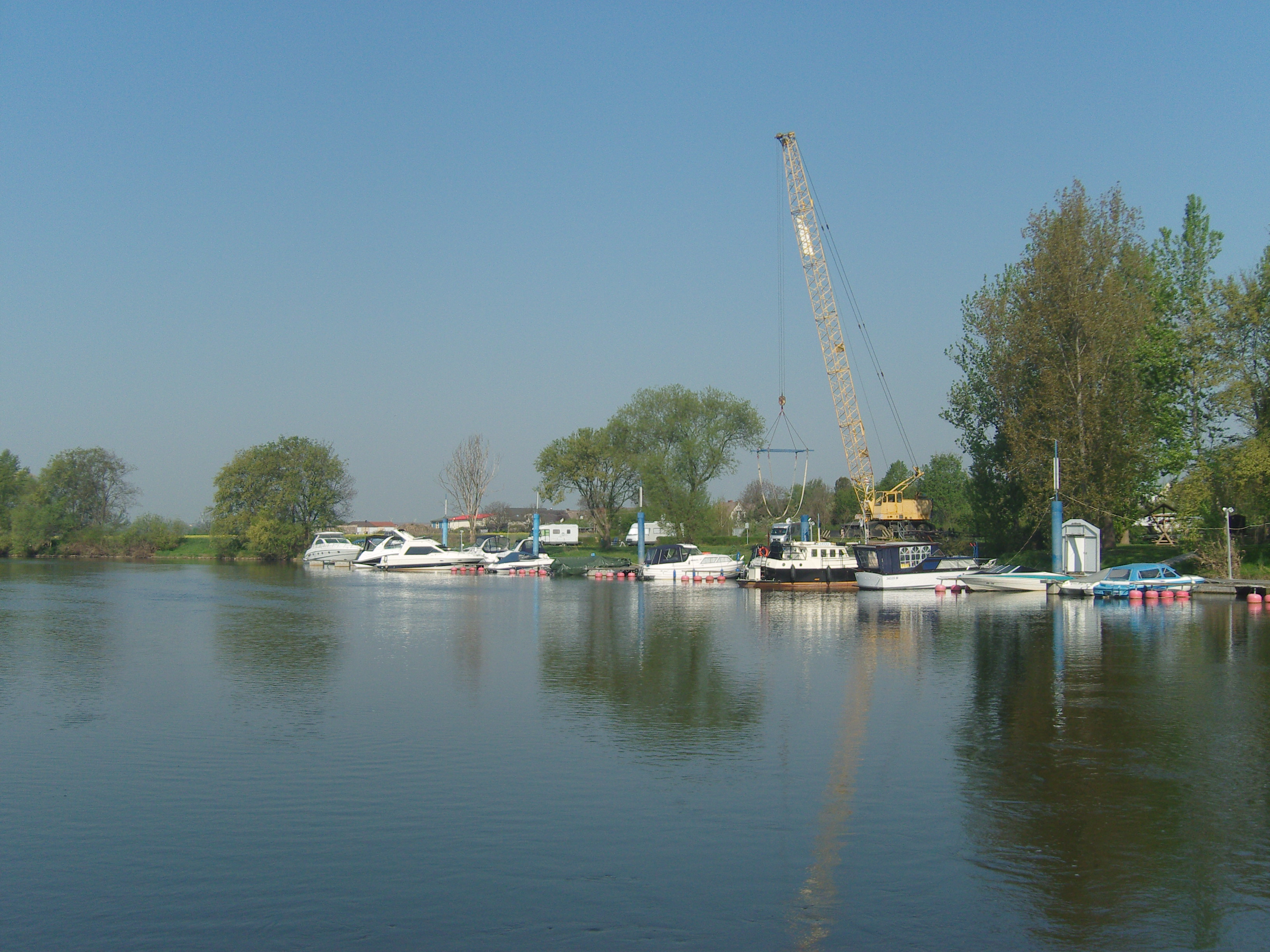 Blick auf das Saaleufer von der Fähre Brachwitz aus